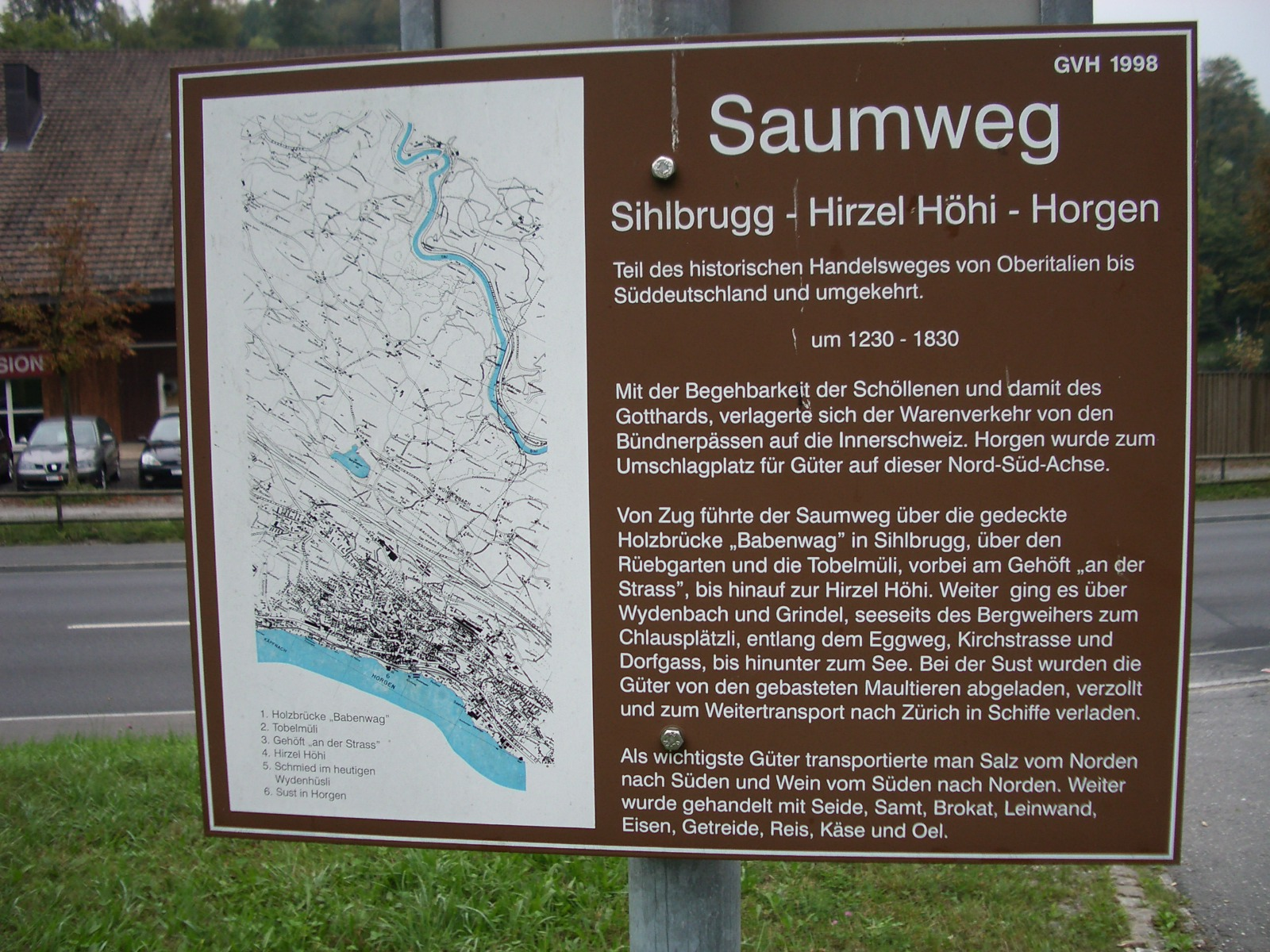 Saumweg Hirzel Höhi, Hirzel ZH, Schweiz